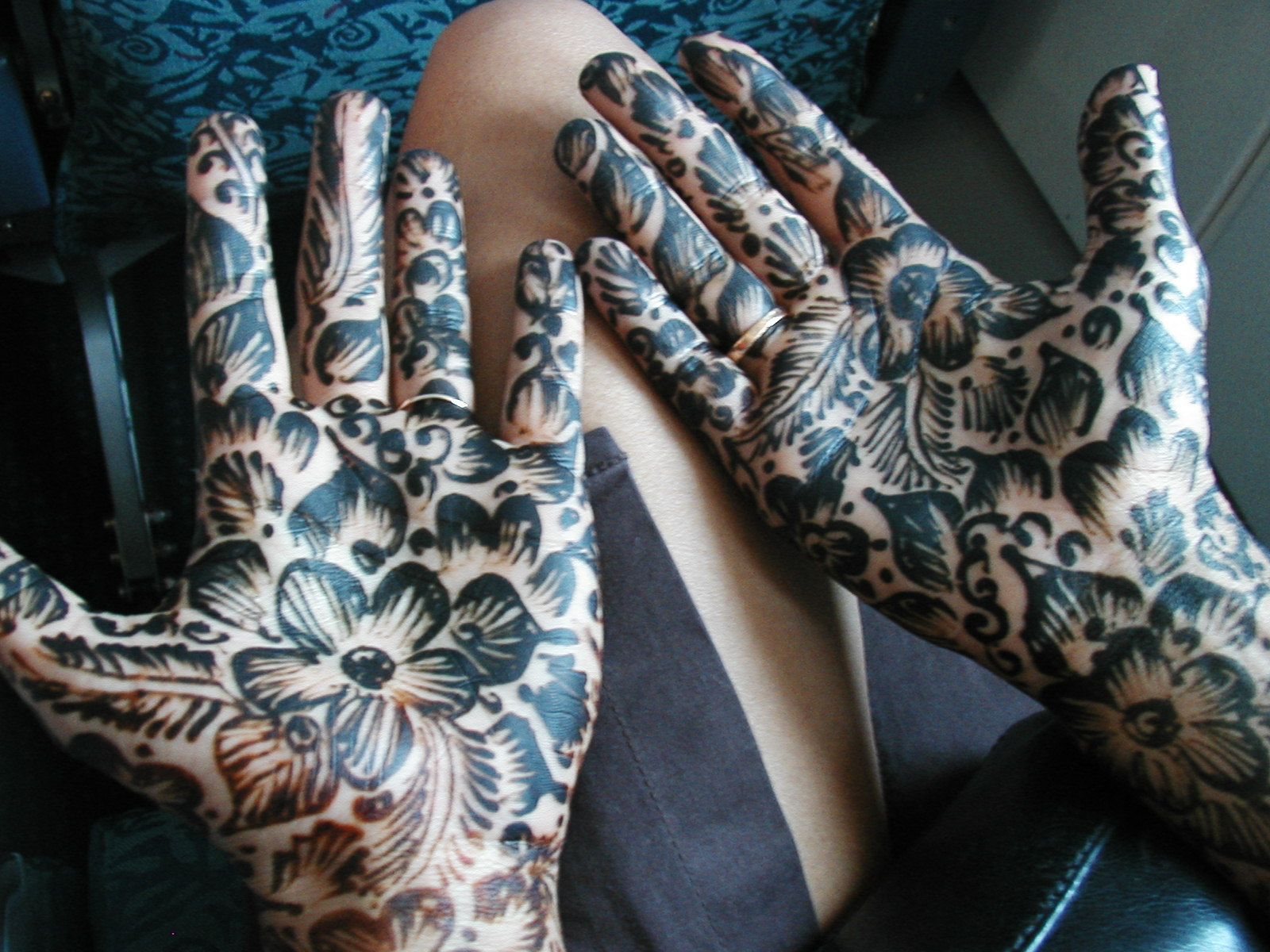 Tatouage au Henné au Maroc